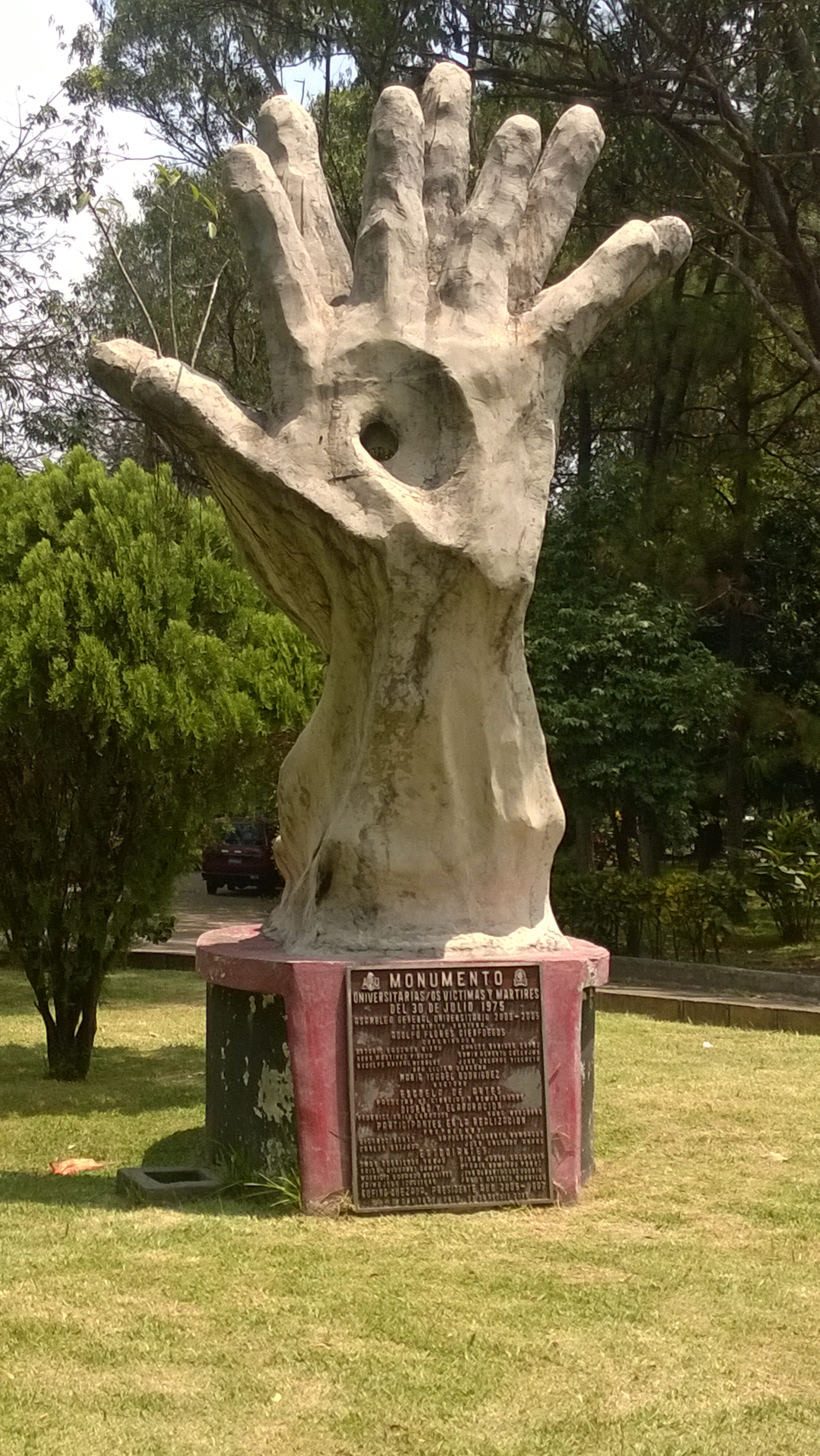 El "Monumento Universitarios/as Víctimas y Mártires del 30 de julio 1975" en la Universidad de El Salvador.